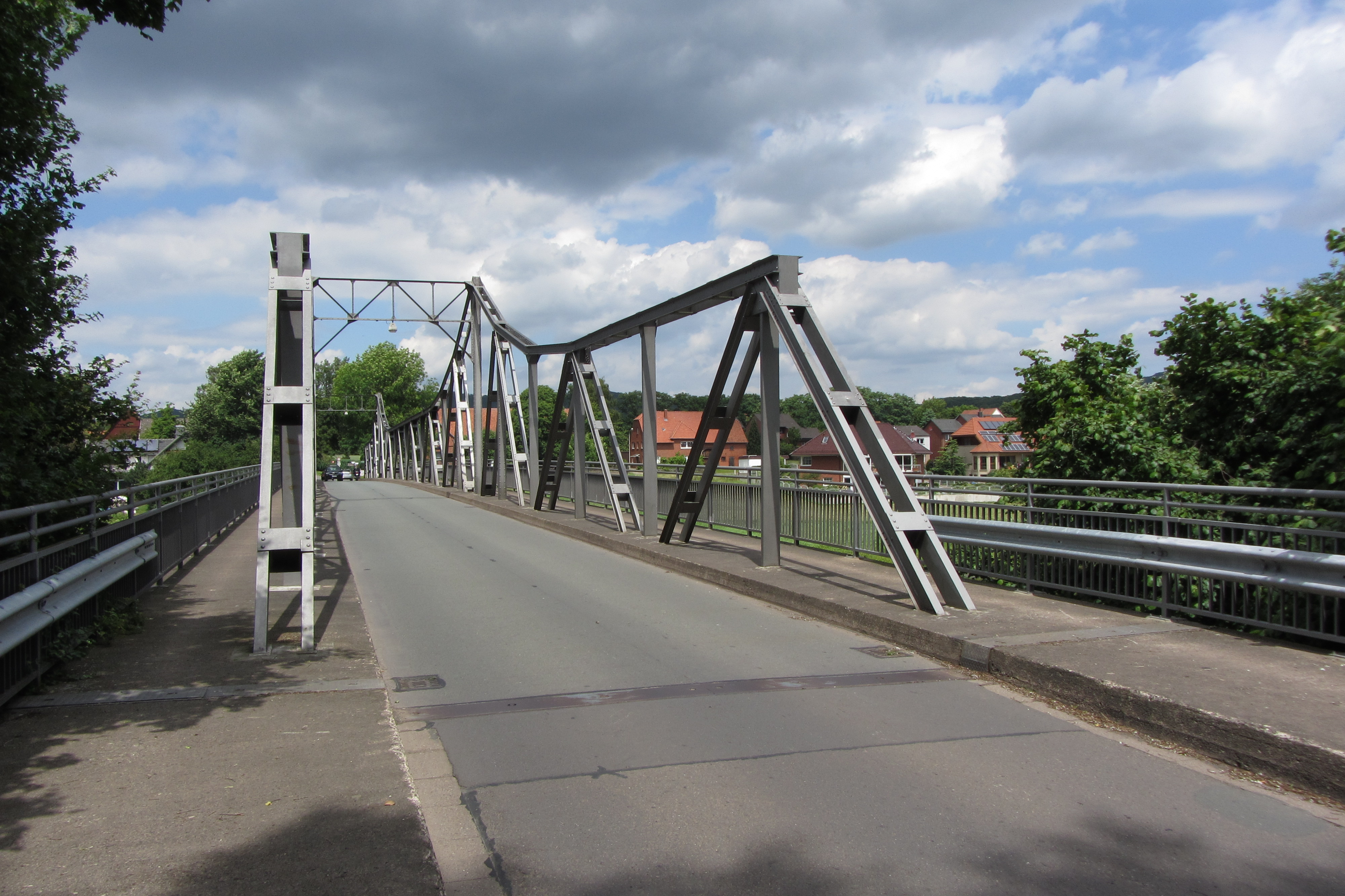 Porta Westfalica-Eisbergen. Weserbrücke an der Straße Aue.